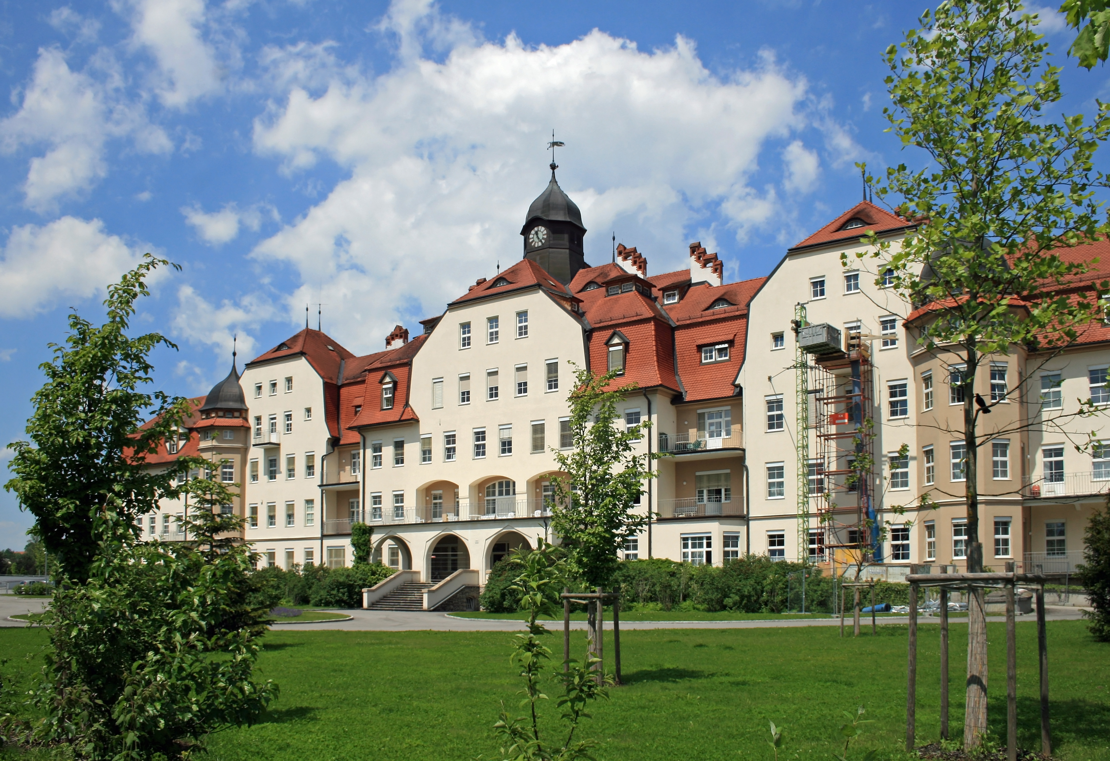 Der am 18. September 1916 eröffnete Altbau des Landeskrankenhauses Steyr. Vorbild waren die Hotelbauten am Semmering